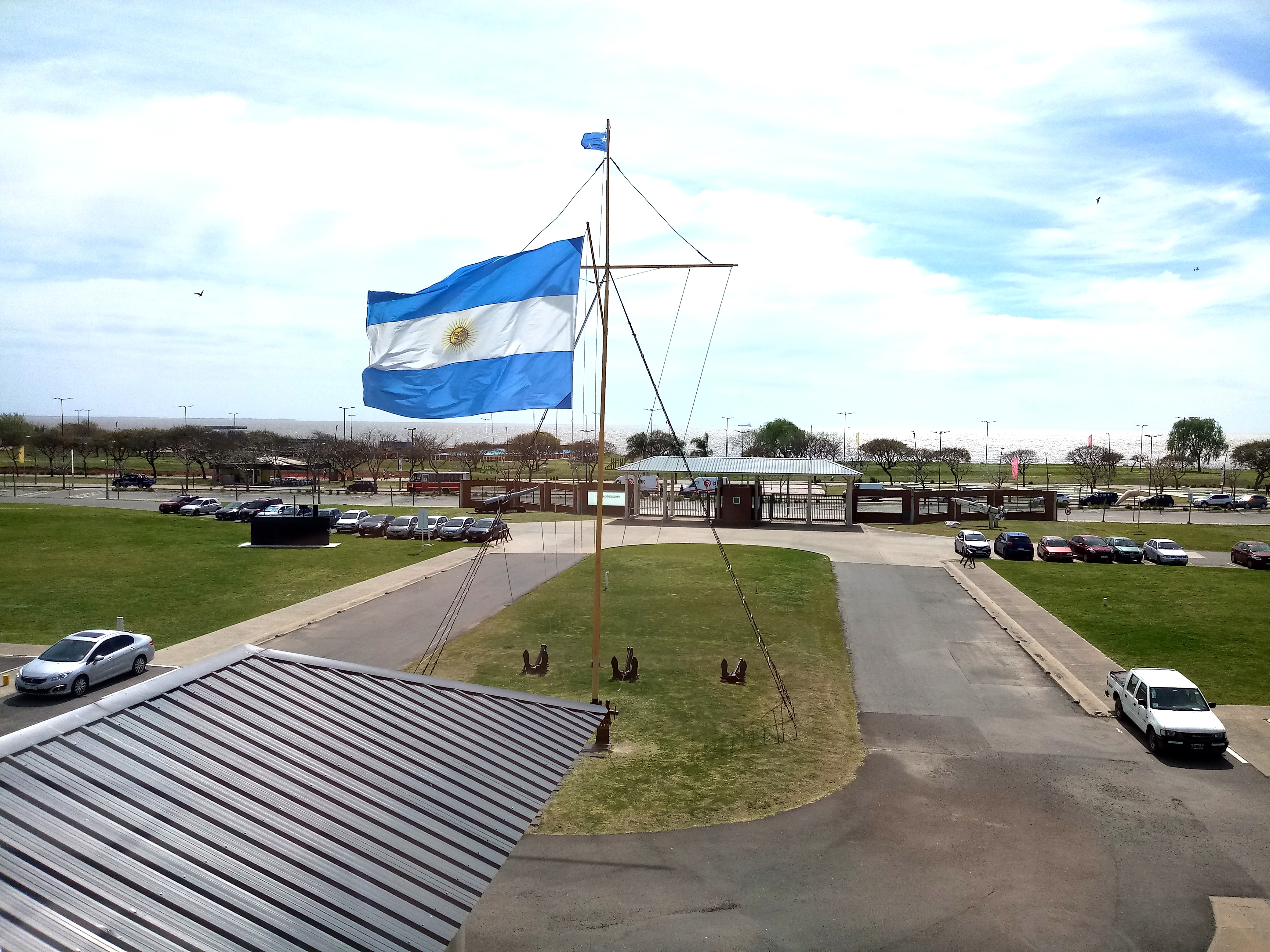 Foto Propia, desde el 3r piso de FDAR, con vista al Río.